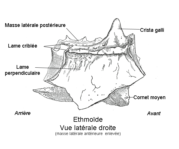 Ethmoïde. Vue latérale. Anatomie humaine